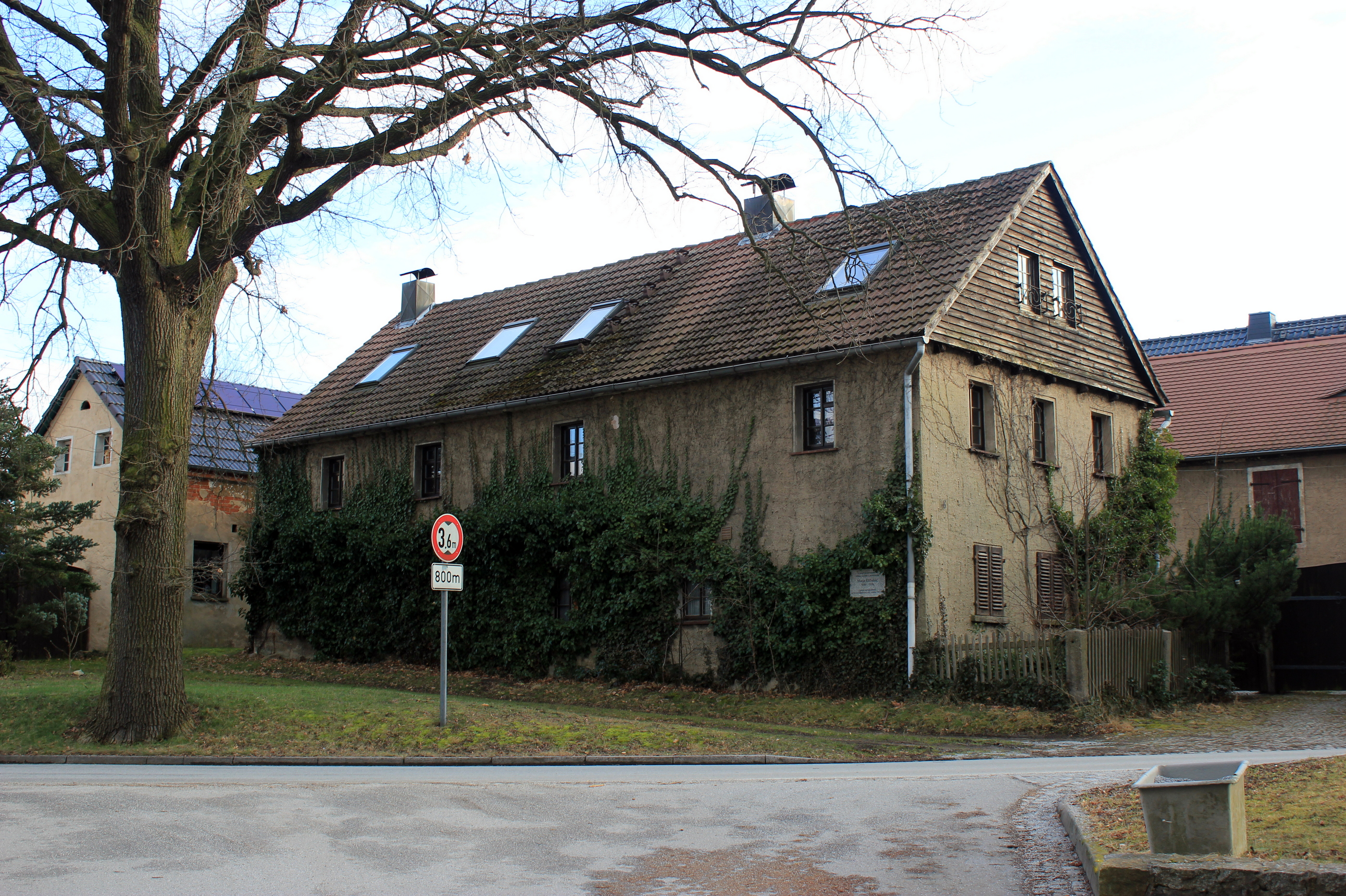 Hornjoserbsce: Ródny dom Marje Kubašec w Chasowje.